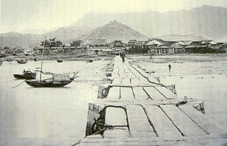 中文（香港）: 1875年九龍寨城的龍津石橋。